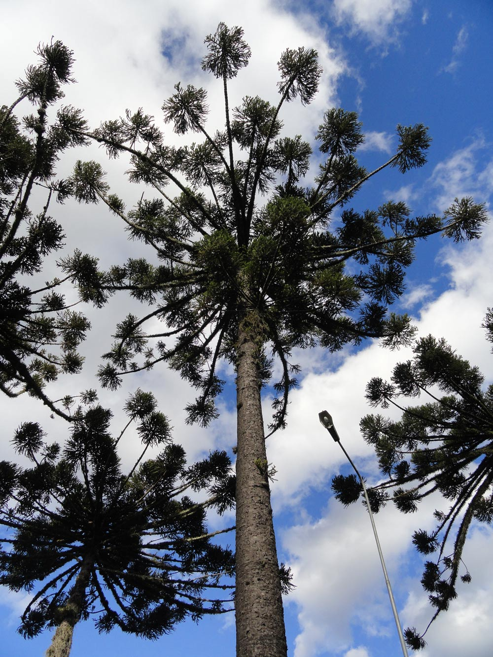 Araucaria angustifolia